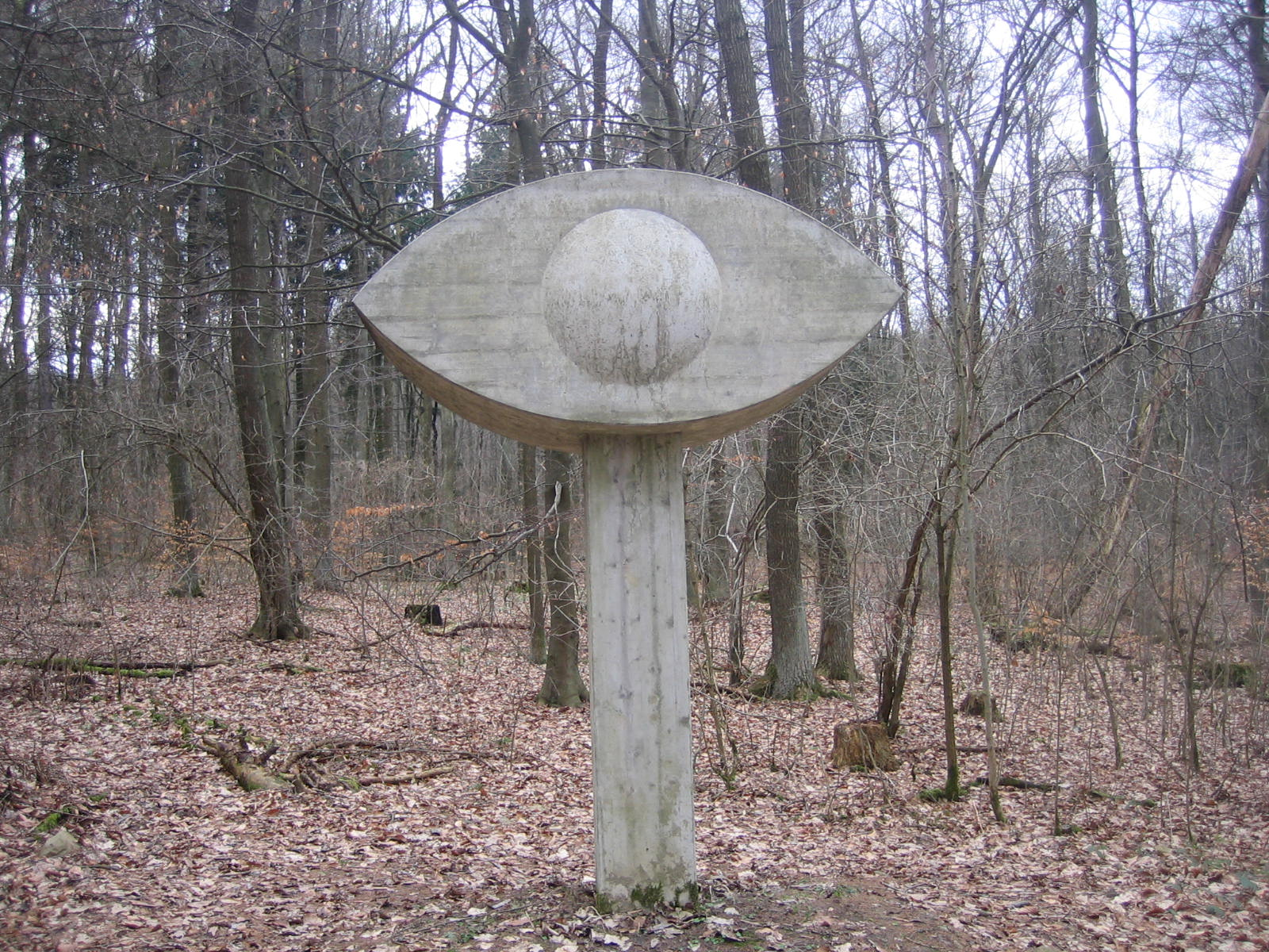 Karl Oskar Blase Grab, auf einem öffentlichem Friedhof auf der Kassel Künstler-Nekropole